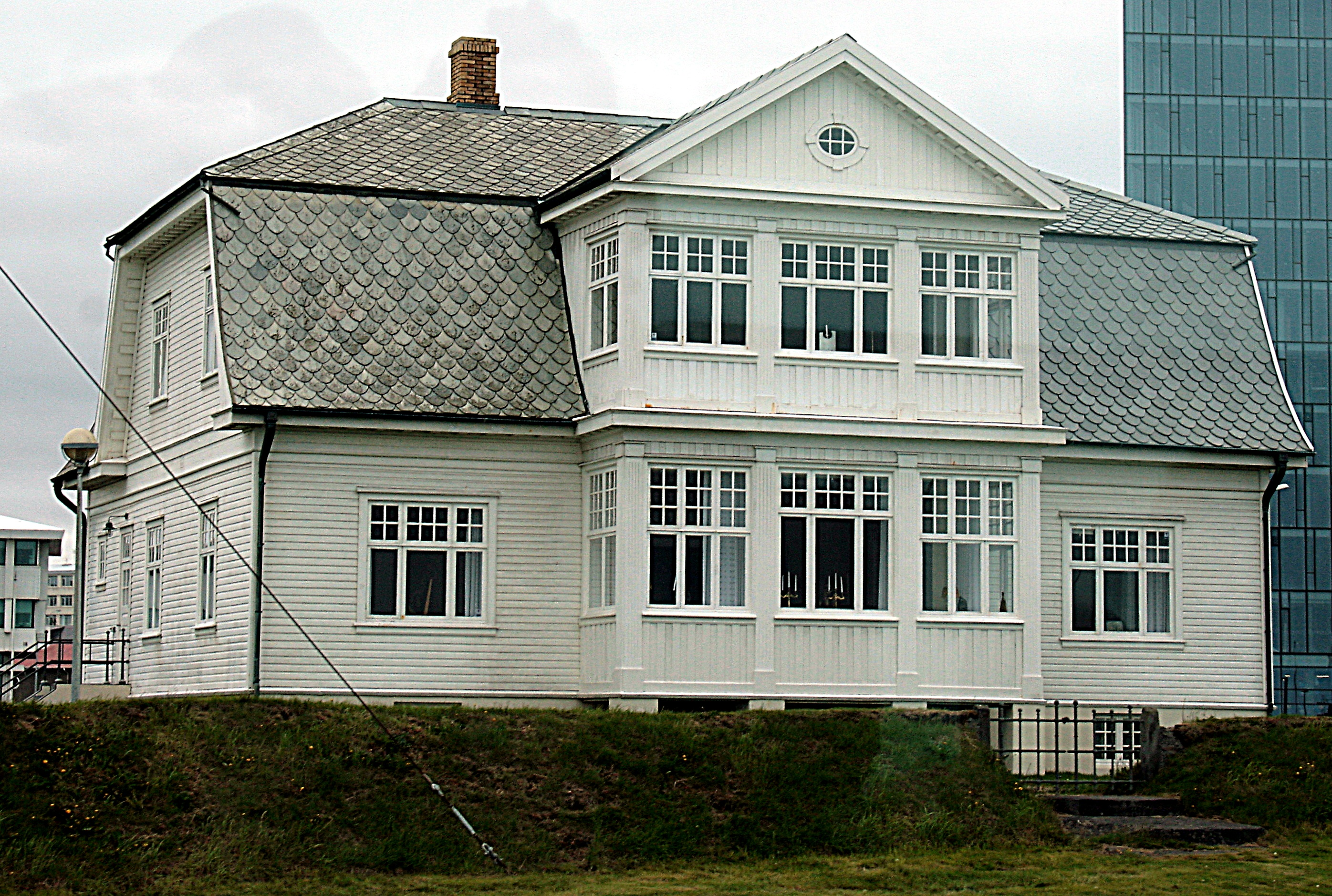 Höfði (Treffen 1986: Ronald Reagan und Michail Gorbatschow)